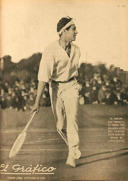 El Grafico del 20 de Octubre de 1923. Edicion 225